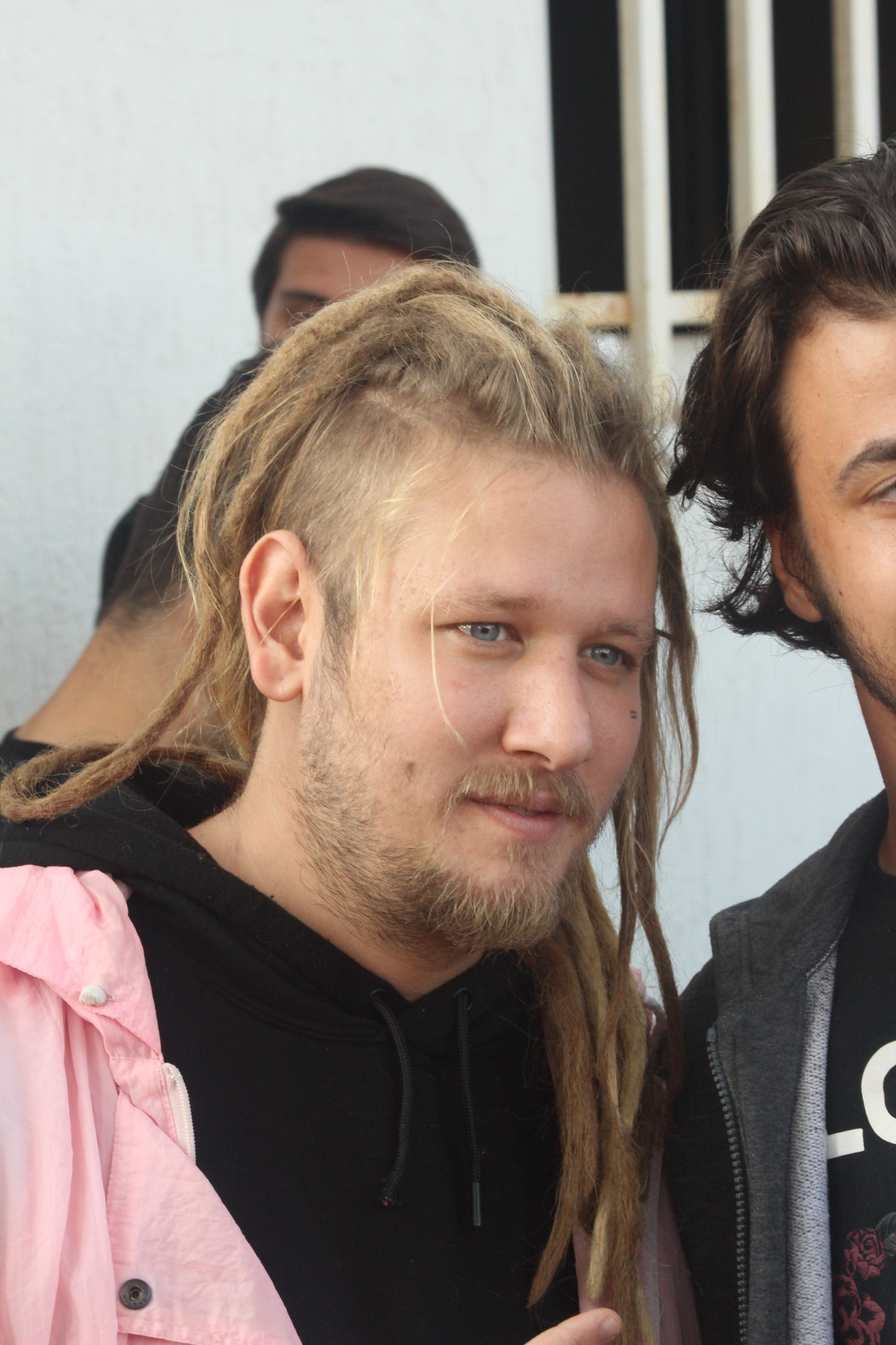 Şanışer, 23 Kasım 2018'de Akdeniz Üniversitesi söyleşisi sonrası hayranları ile fotoğraf çektirir iken.